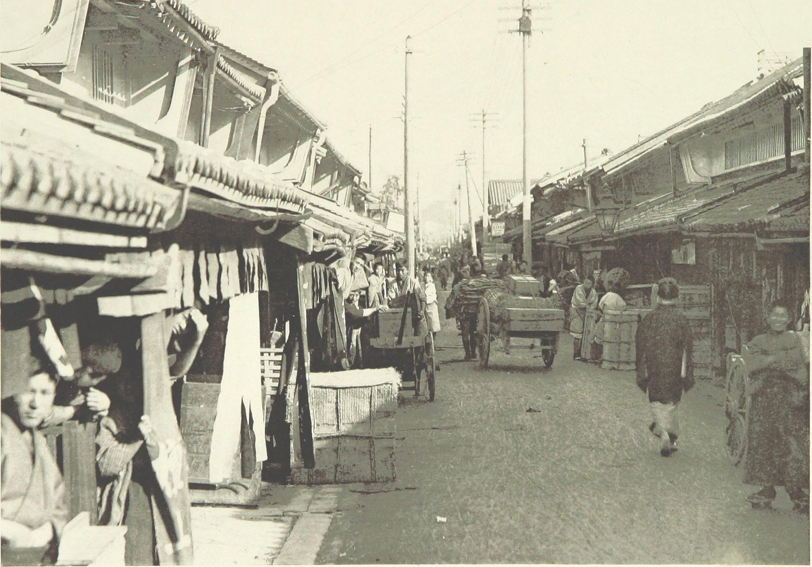 Osaka, Japan in 1880s